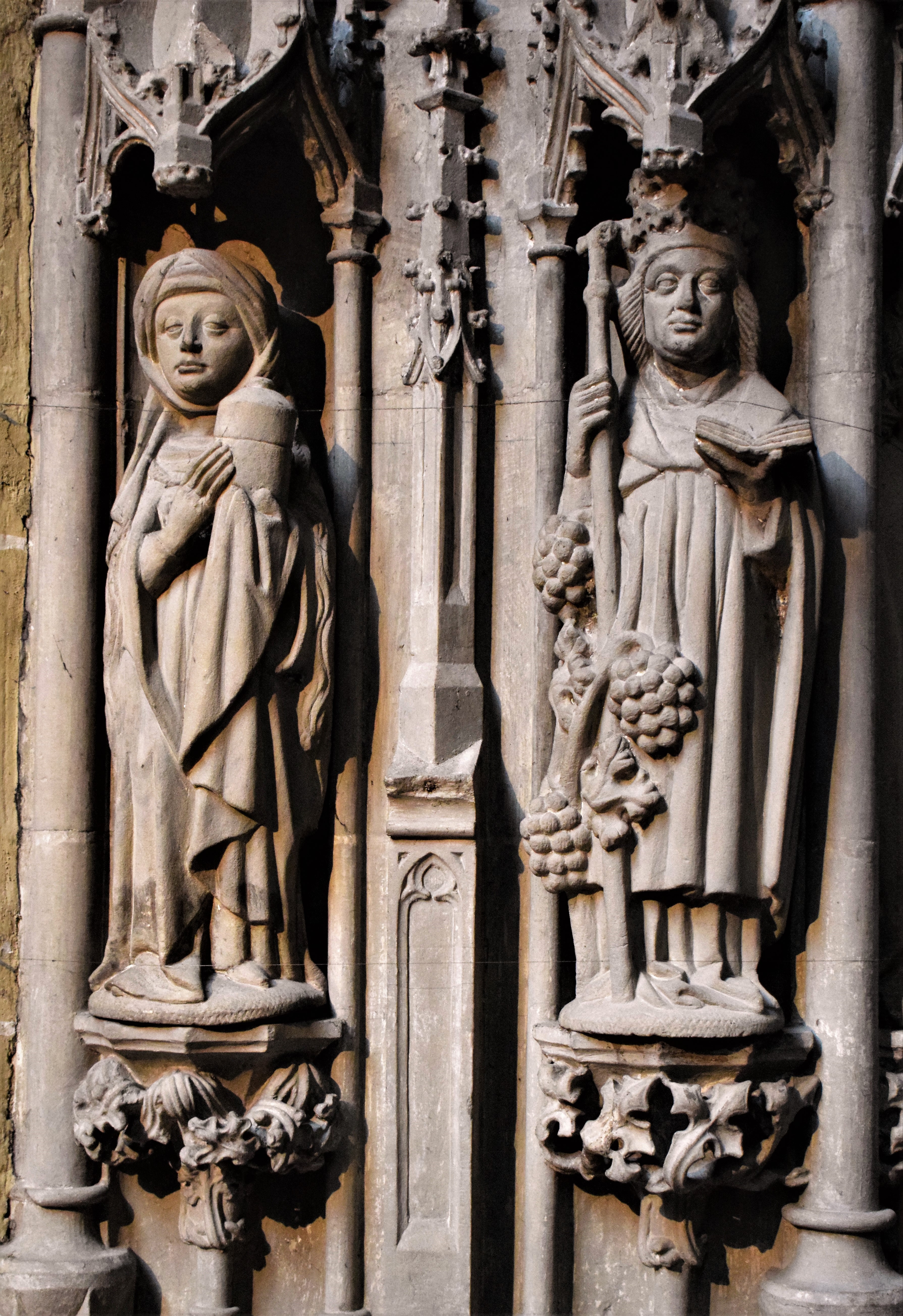 Kirche St. Johannes (Kitzingen), Figuren am Sakramentshaus (um 1470): Maria Magdalena und der heilige Urban